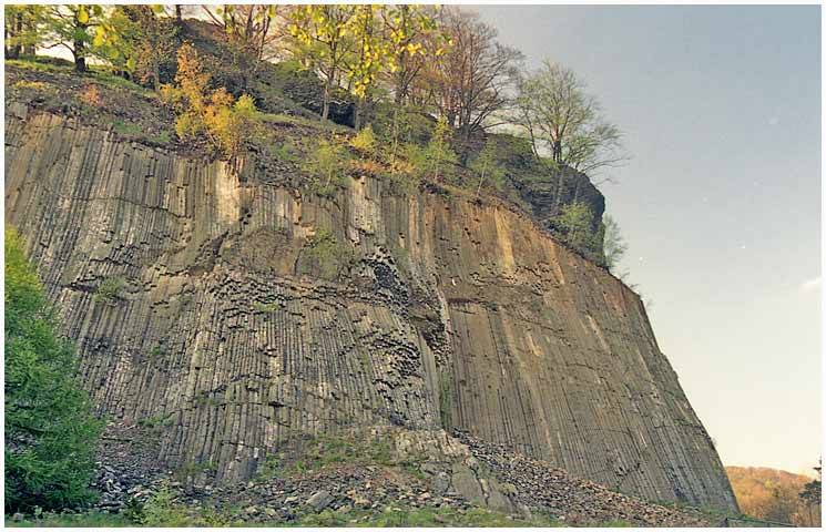 Fotografie z NPP Zlatý vrch.